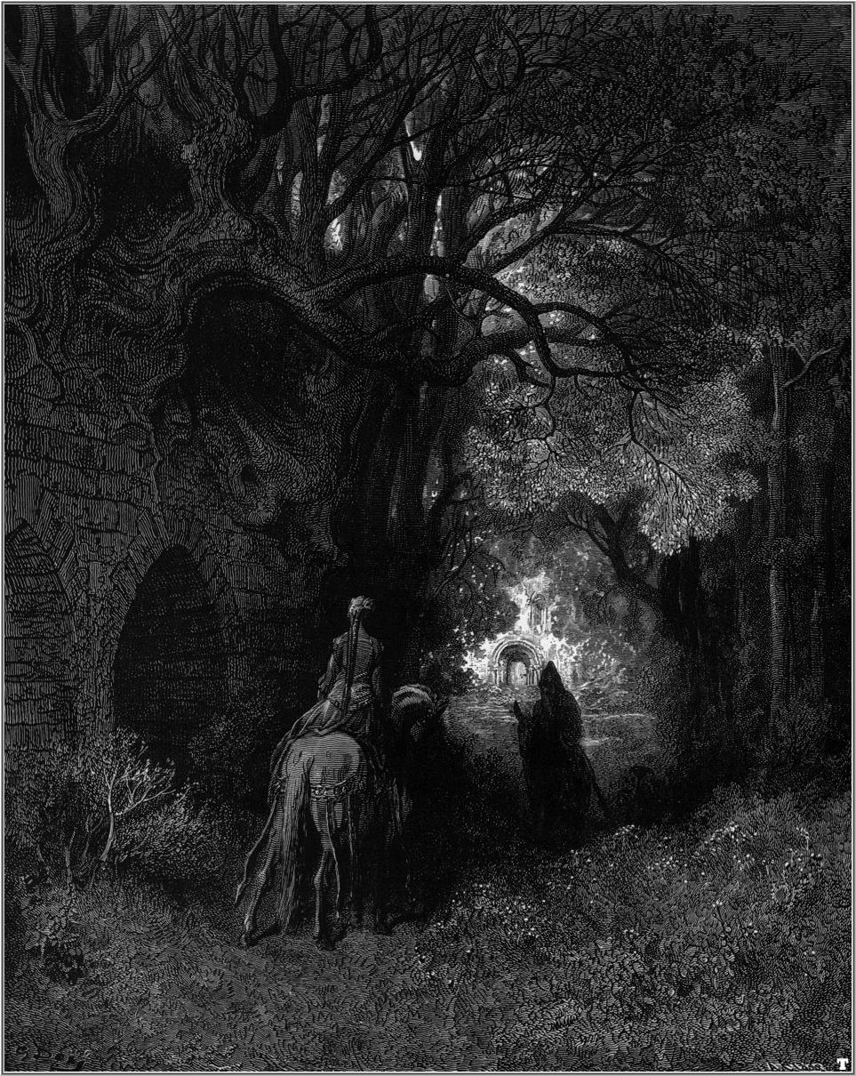 illustration of Ludovico Ariosto’s “Orlando Furioso”.